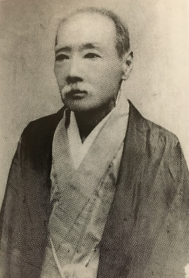 鈴木三樹三郎の肖像写真。